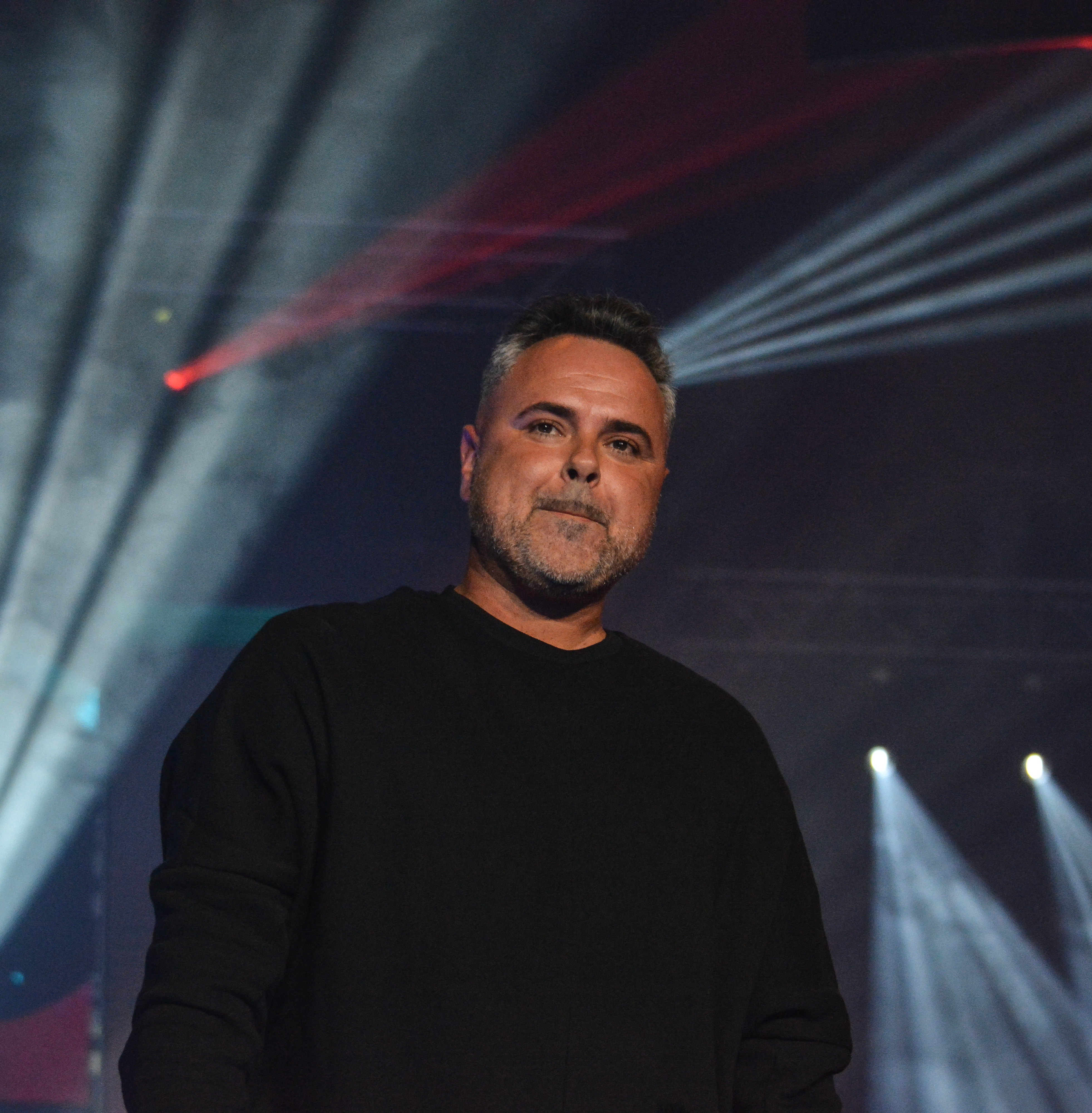 Billboard Latin Music Showcase Chile 2018, Movistar Arena, Santiago, Chile